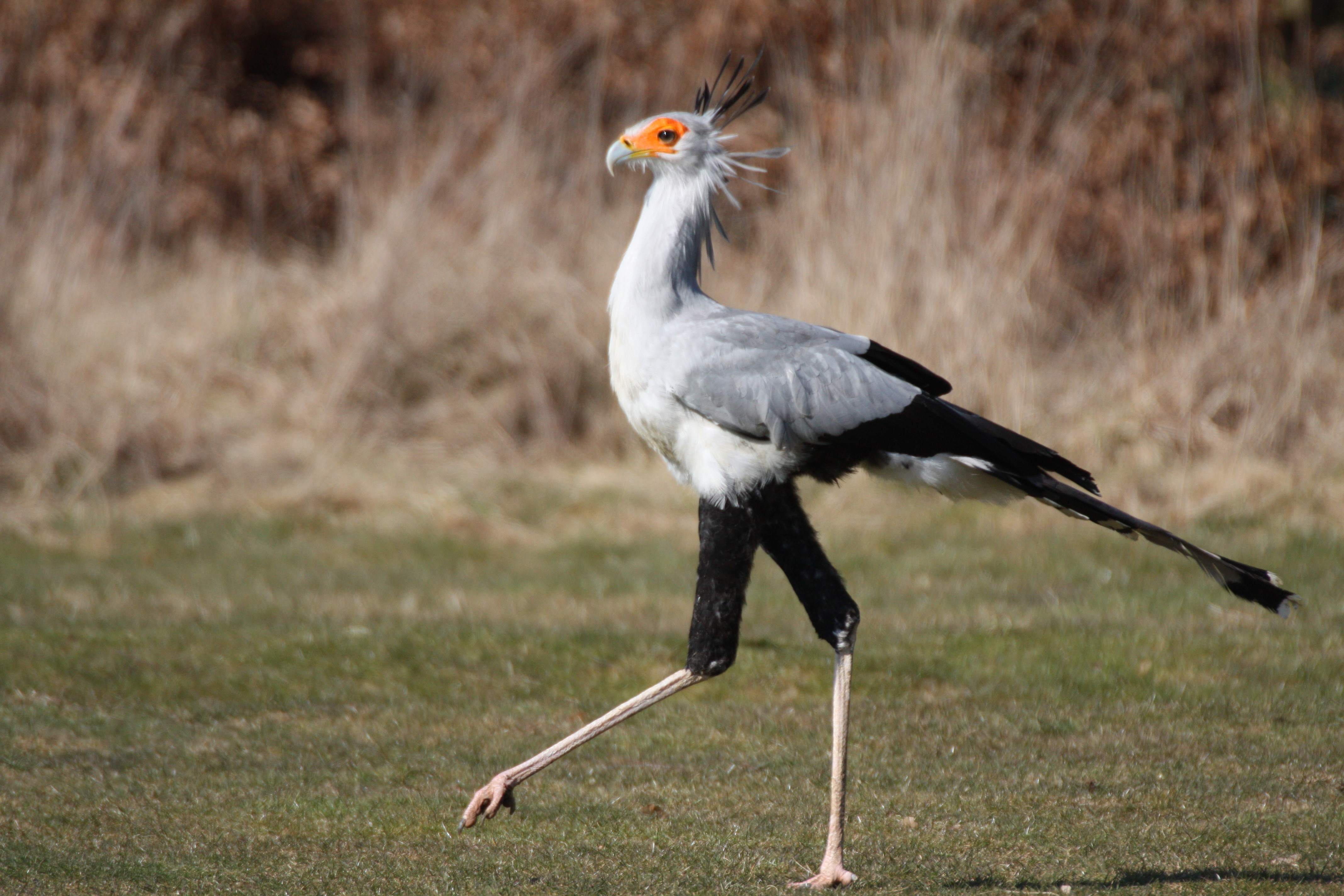 Sagittarius serpentarius, captive, England